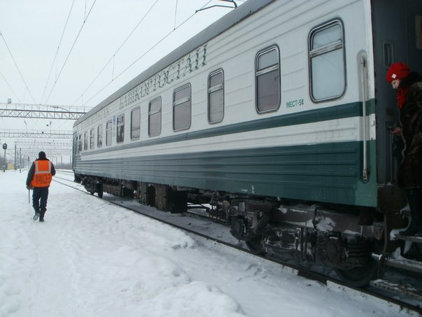 Вагон от фирменного поезда Башкортостан